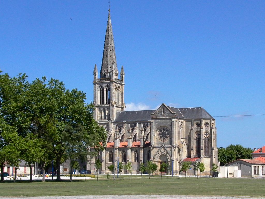 L'église St Trelody de Lesparre